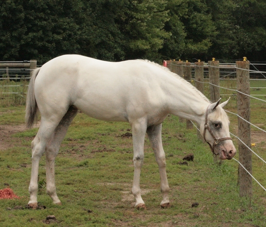 Gi Gi